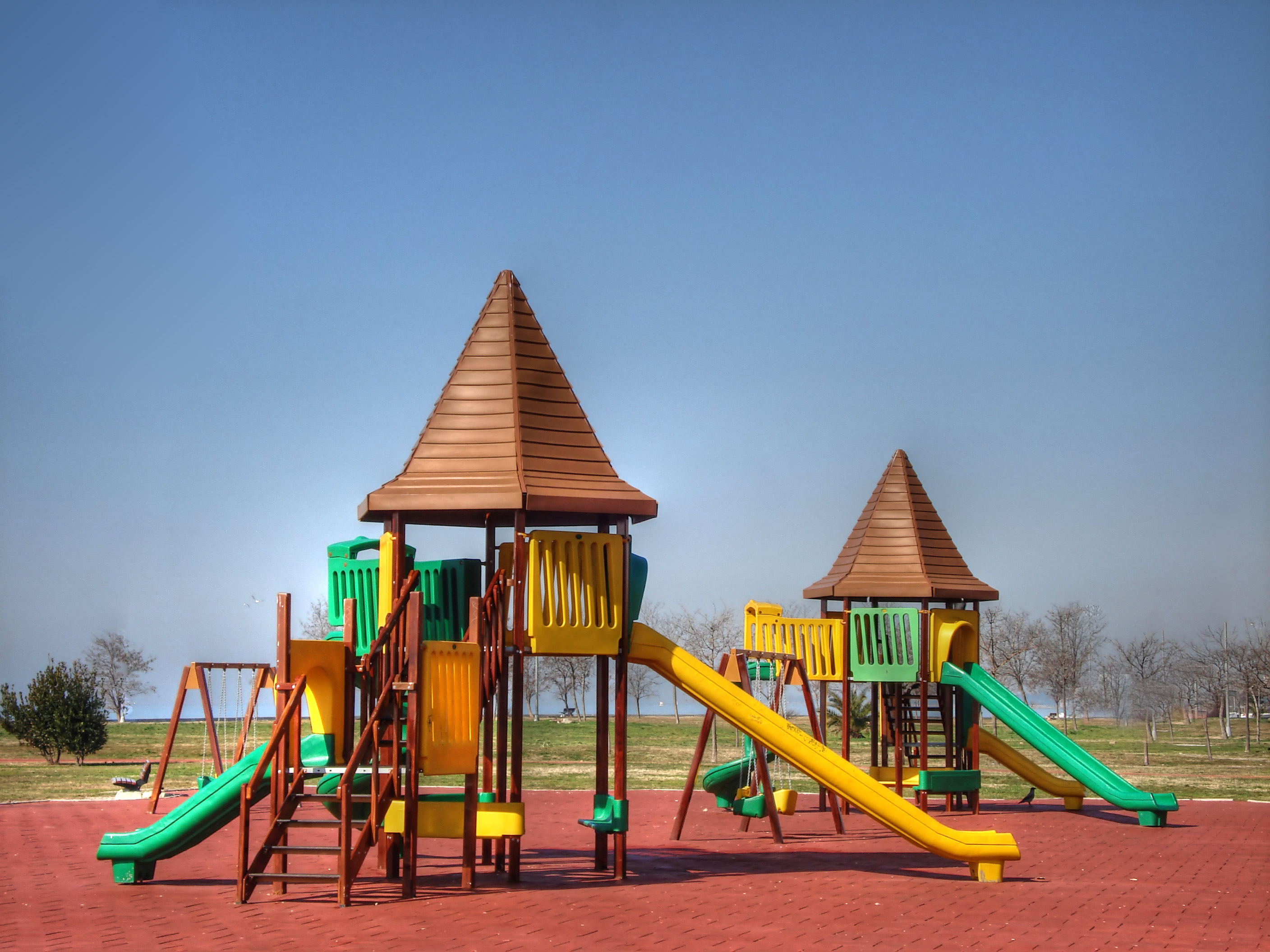 Game park